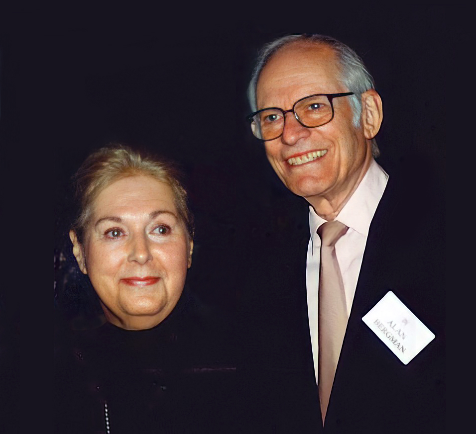 Wash D.C. 2002